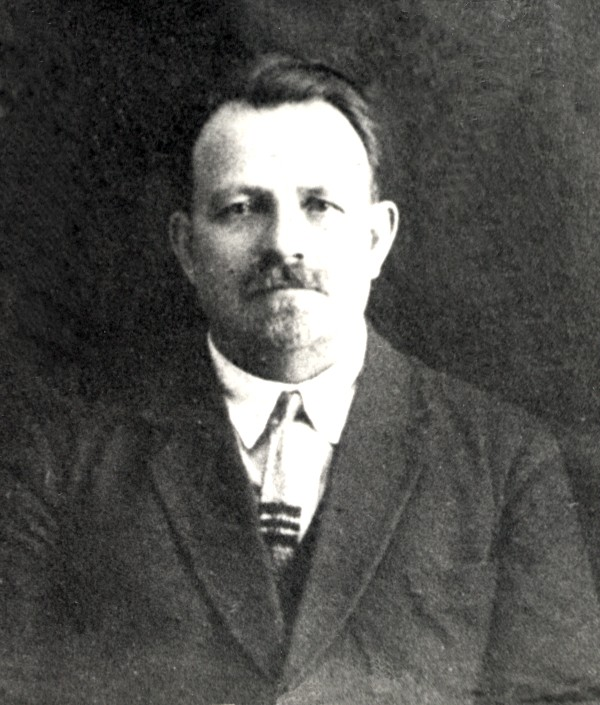 Яков Яковлевич Винс. Фото первой половины 1920-х годов